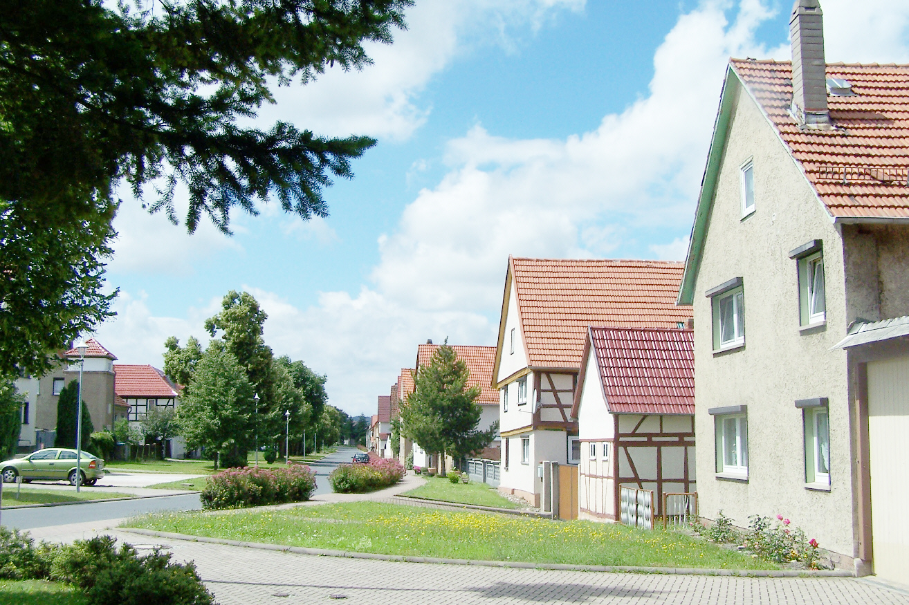 In der Ortslage von Ebenheim.